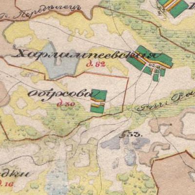 Деревня Обухово на карте 1850 года